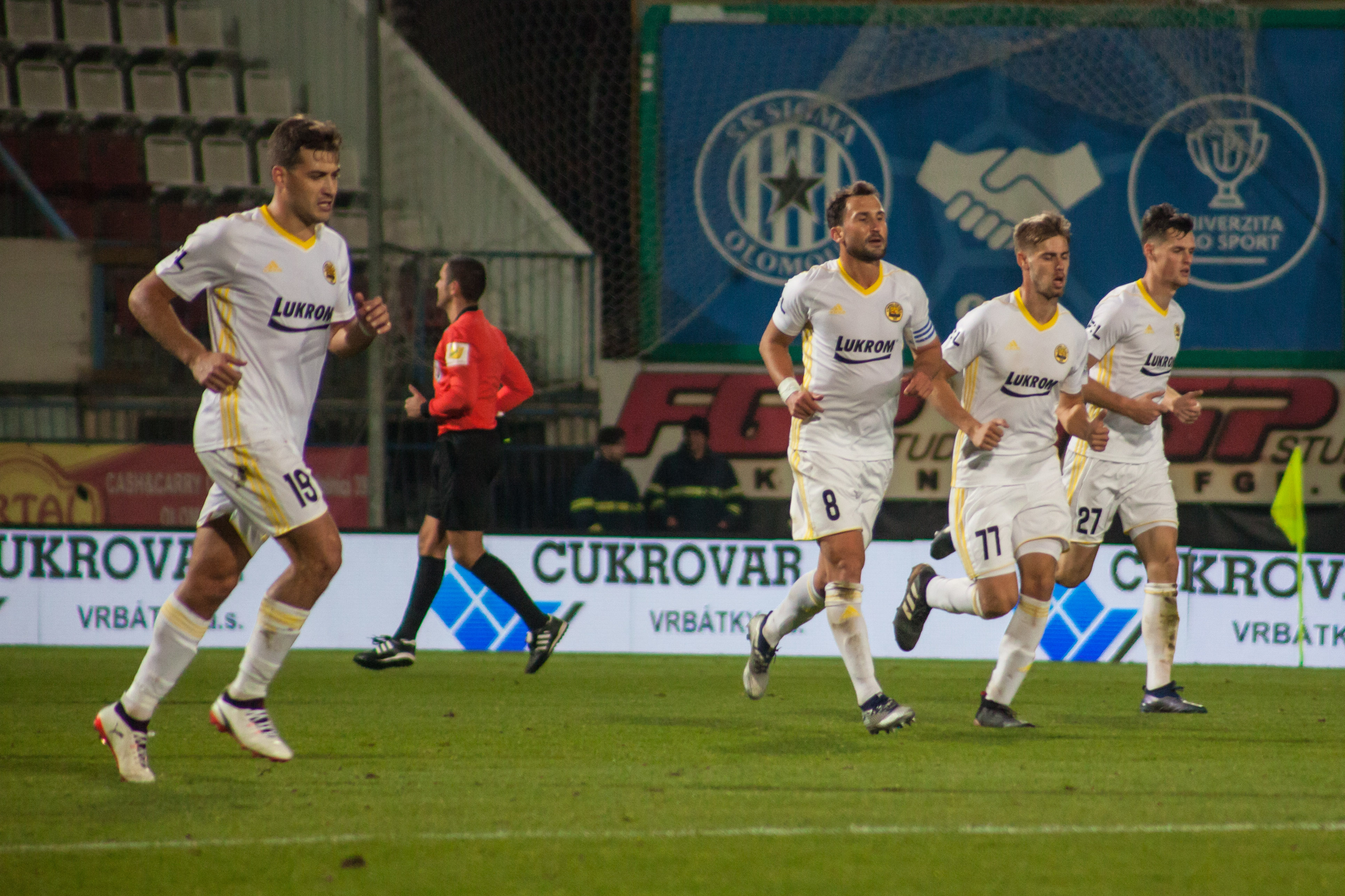 Hráči FC Fastav Zlín při venkovním pohárovém zápase proti SK Sigma Olomouc (2:1), Andrův stadion, Olomouc, Olomoucký kraj, Česko Аҧсшәа: Players of FC Fastav Zlín at football match against SK Sigma Olomouc, Ander's stadium, Olomouc, Olomoucký kraj, Czechia